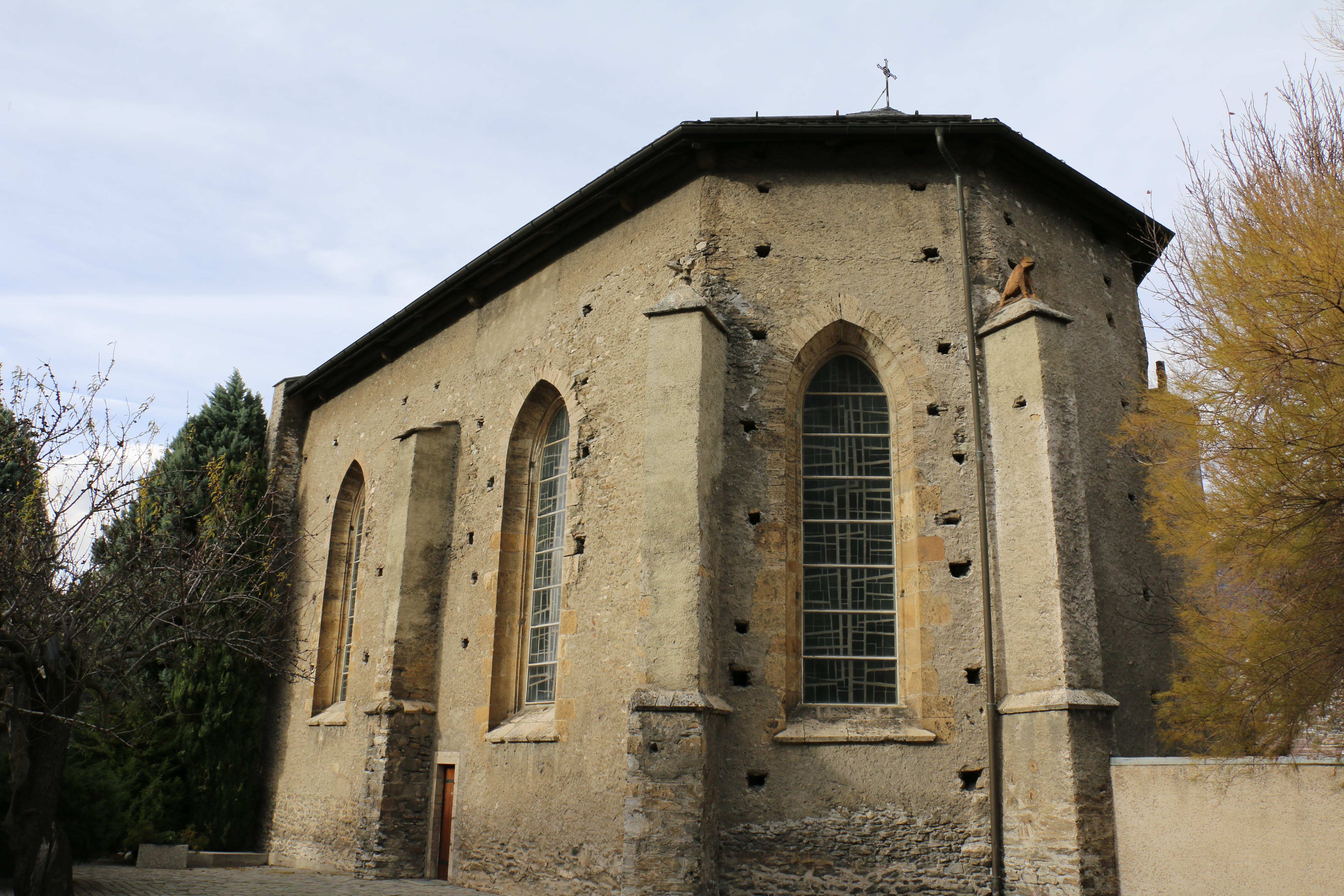 Couvent de Géronde